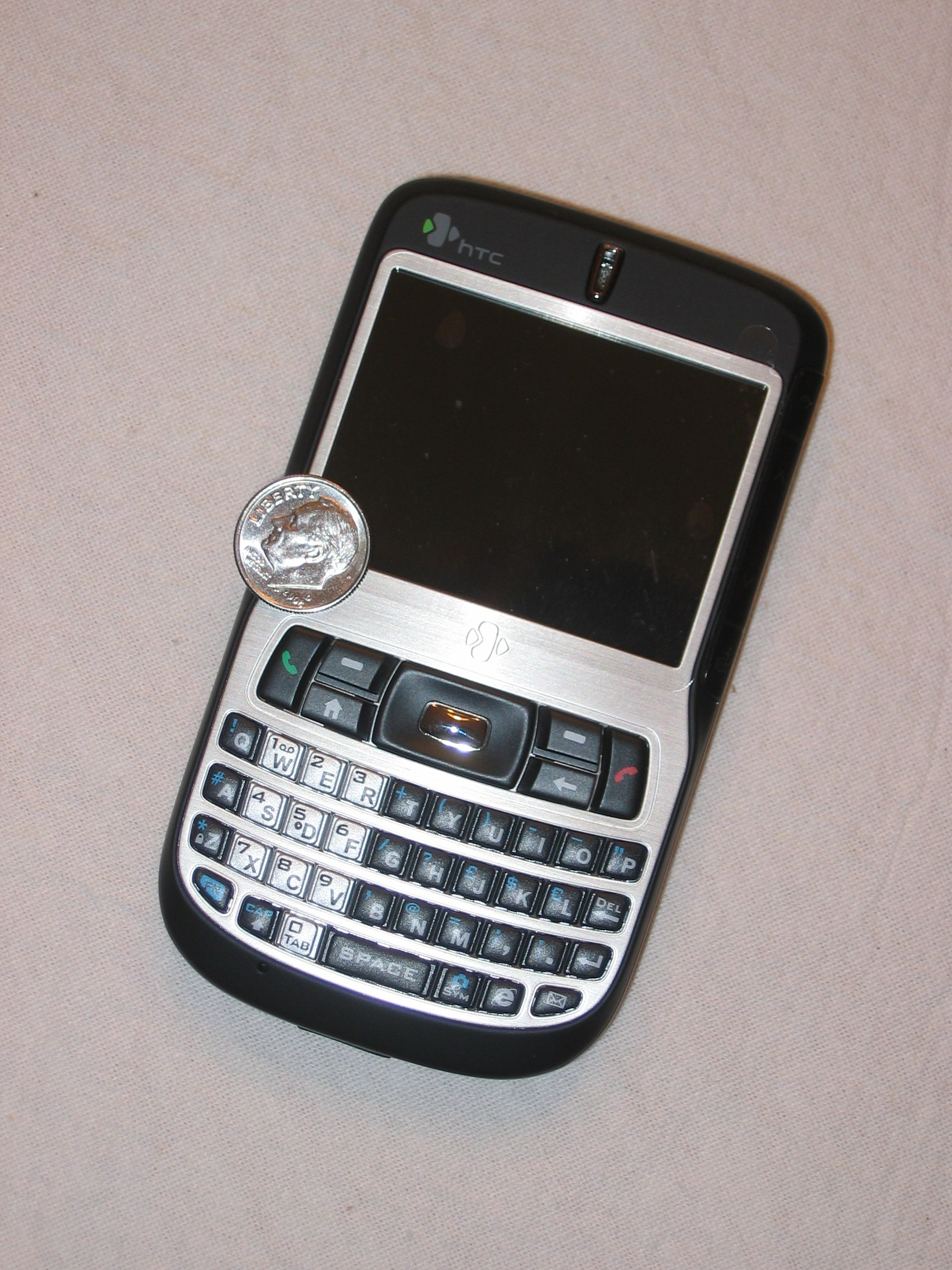 HTC S620.